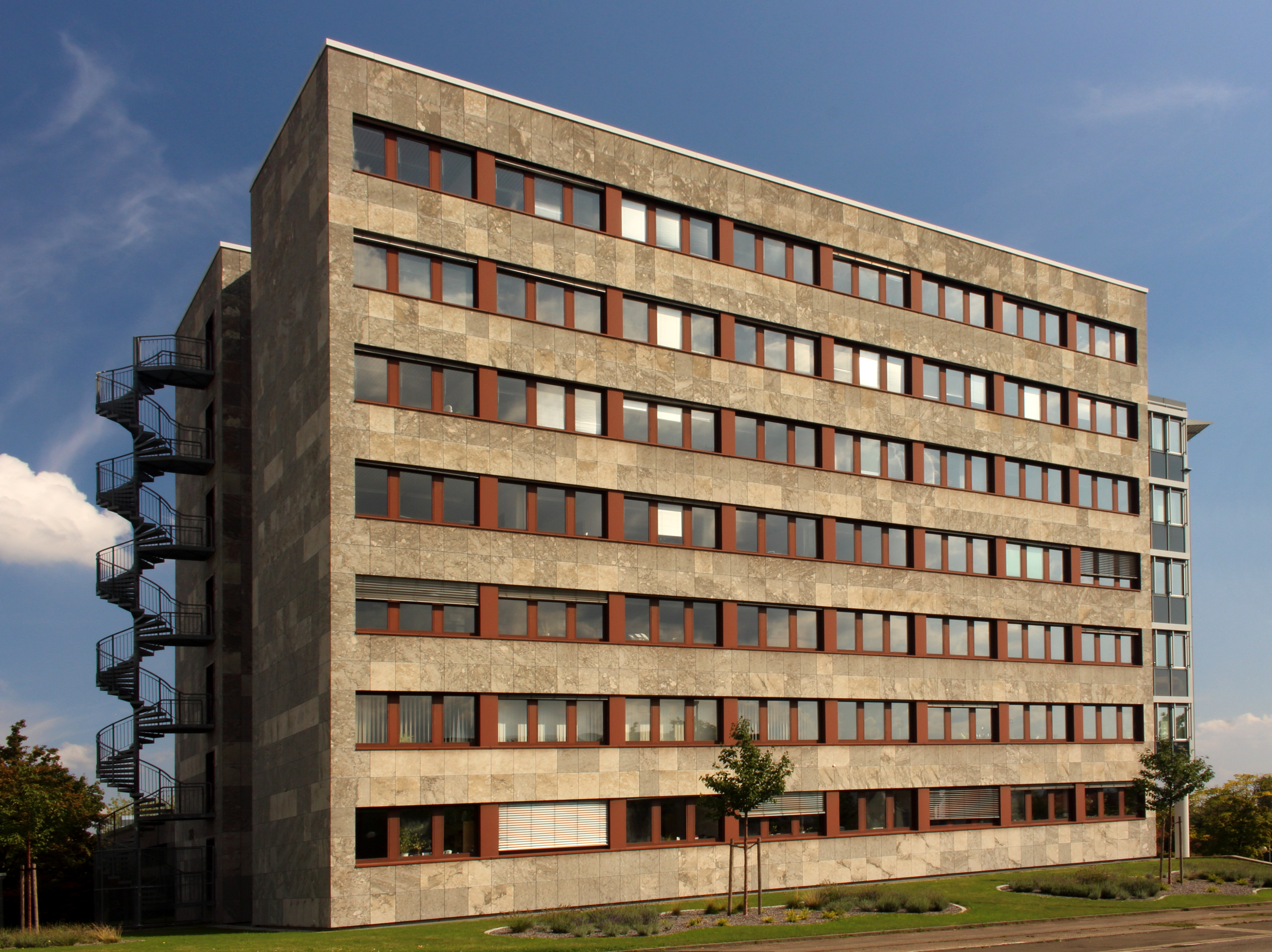 Finanzgericht Rheinland-Pfalz, Amts- und Verwaltungsgericht Neustadt an der Weinstraße.